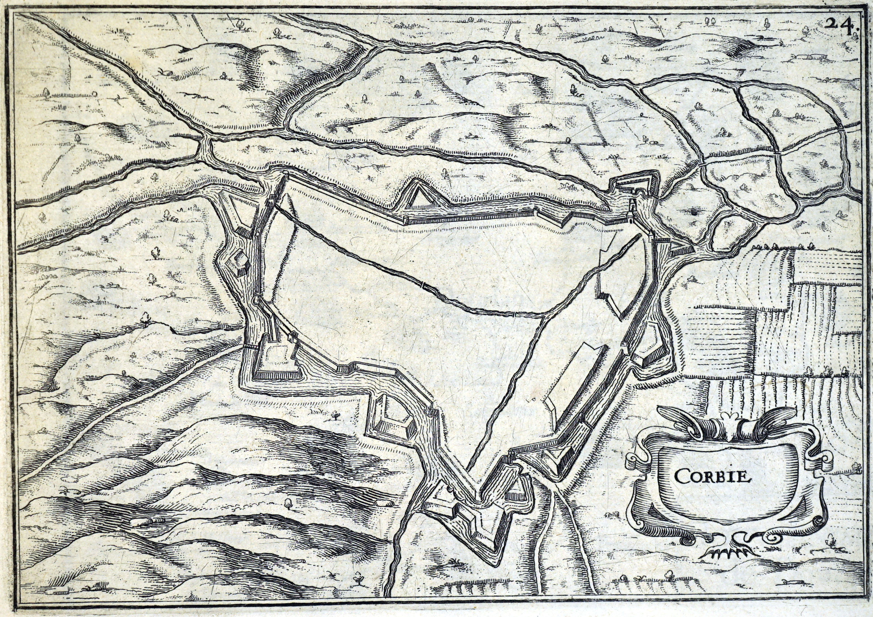 dessin de Tassin, 1634.